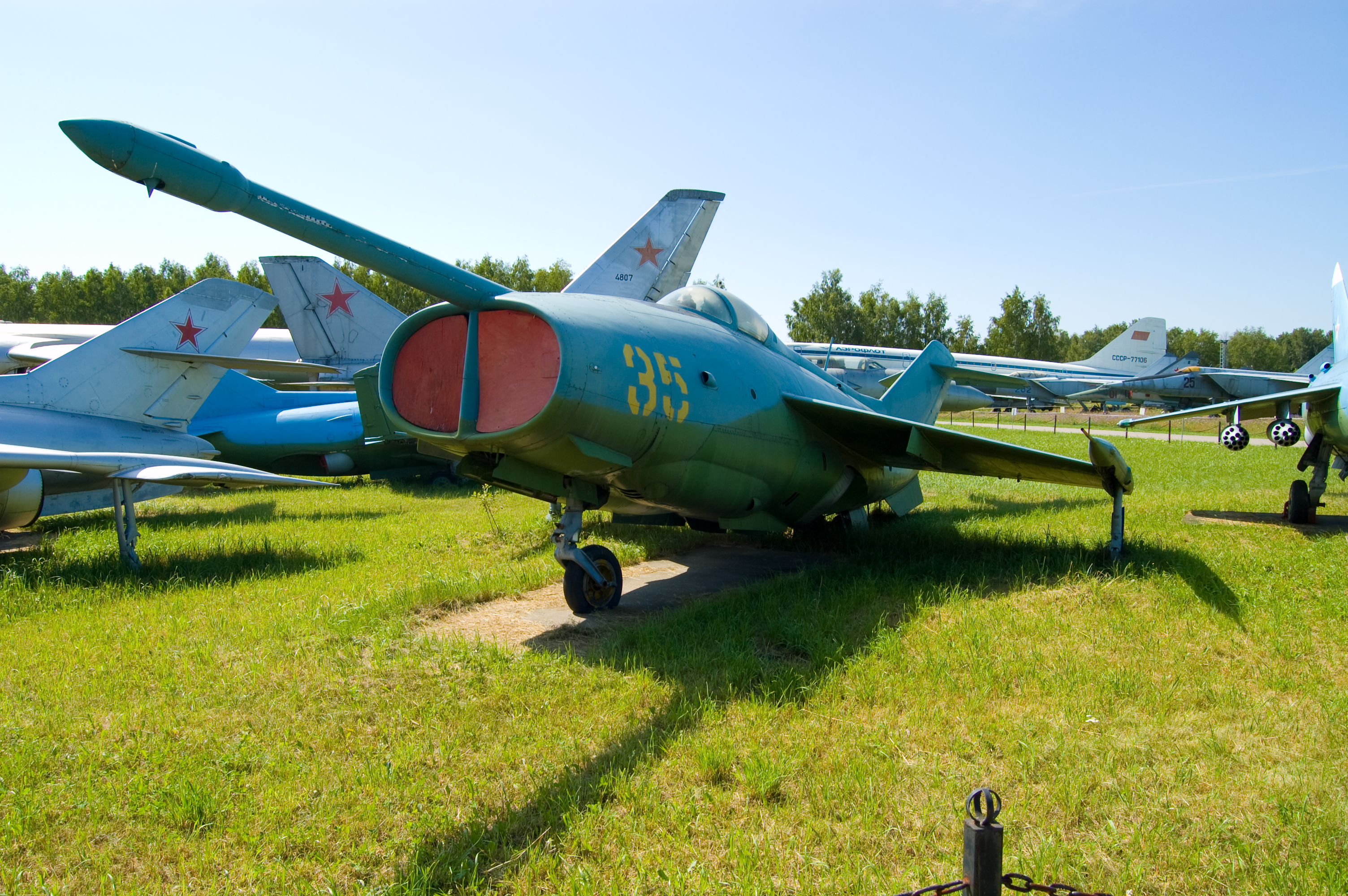 a Yakovlev Yak-36 Freehand